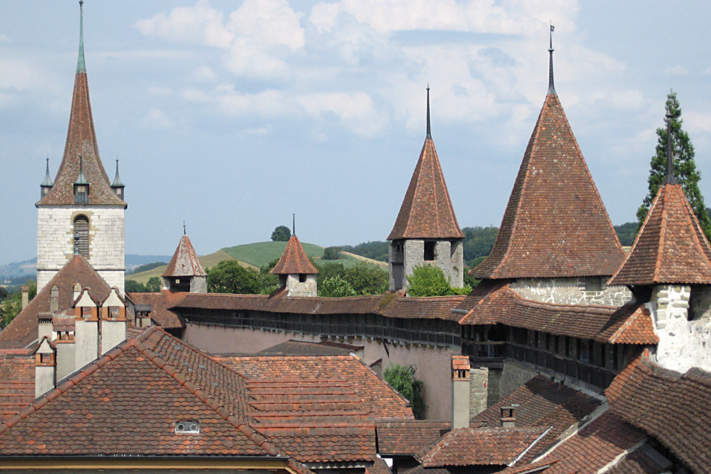 Blick über Altstadt und Ringmauer in Murten, Schweiz